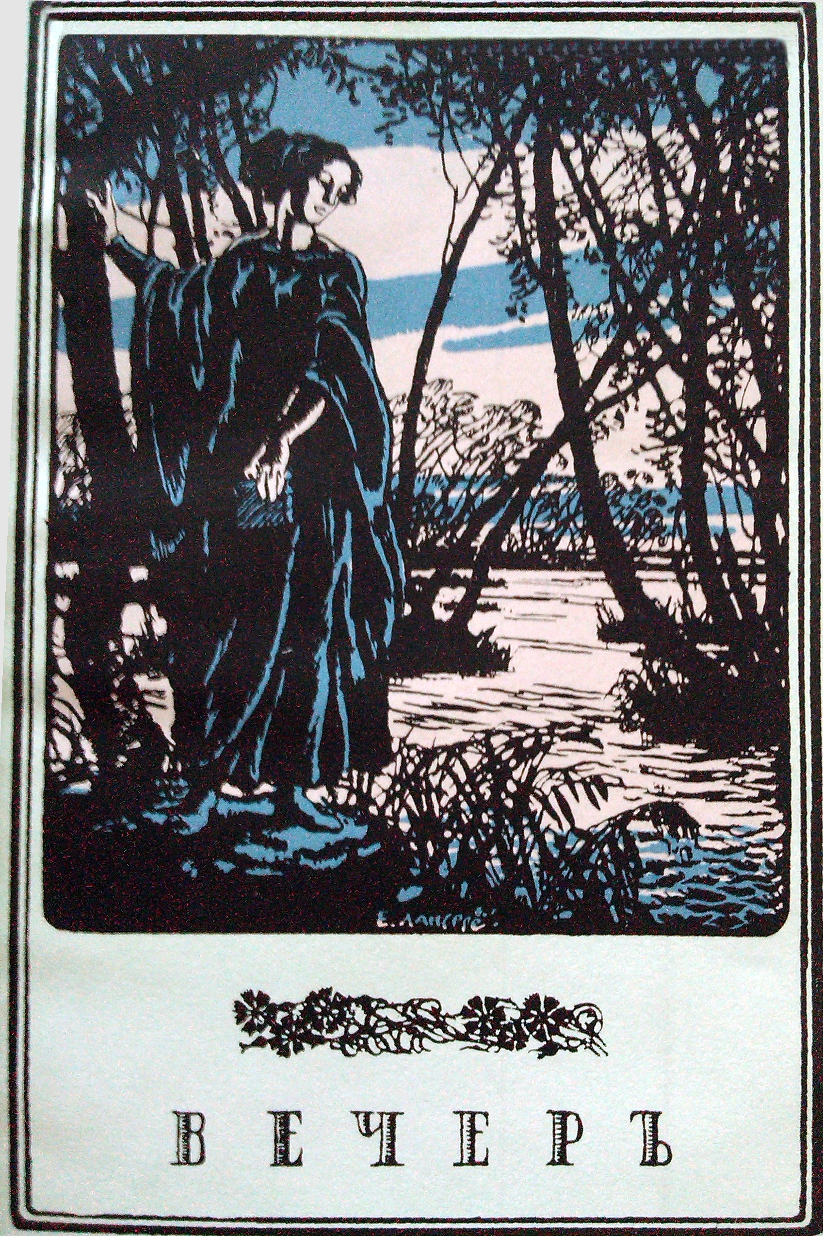 Первая страница первого сборник стихов А. Ахматовой "Вечер", Цех Поэтов, 1912